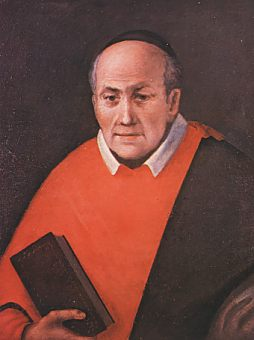 Portrait, im Haus von Vincenzo Romano in Torre del Greco.